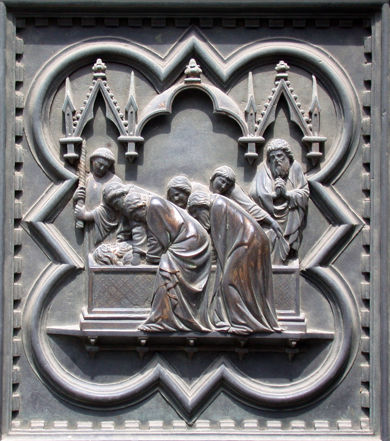 Firenze, Battistero di San Giovanni Battista, porta sud di Andrea Pisano, formella con sepoltura del santo. Foto personale aprile 2005.